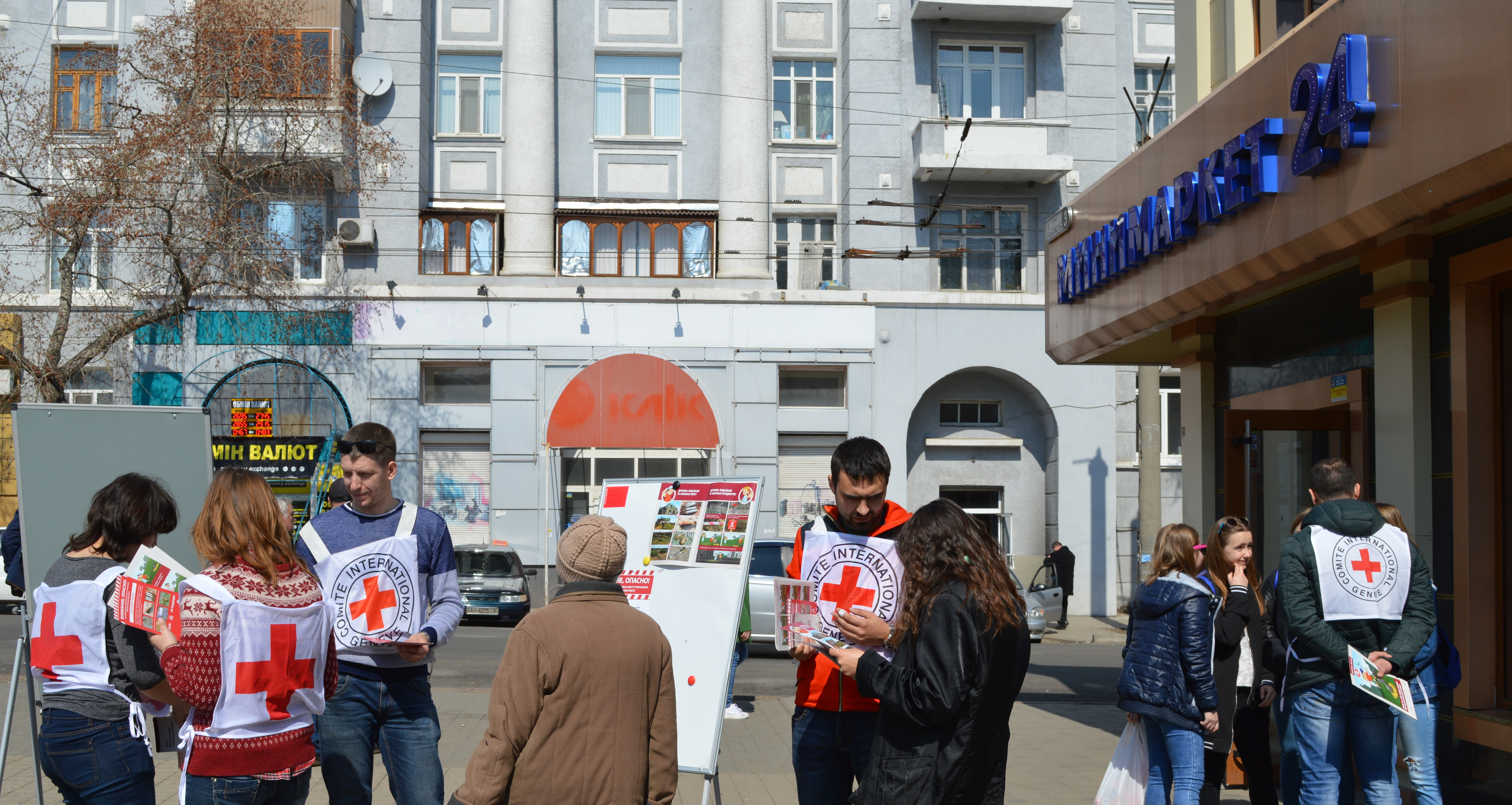 Працівники МКЧХ роздають ліфлети мешканцям міста, інформуючи їх про мінну небезпеку.